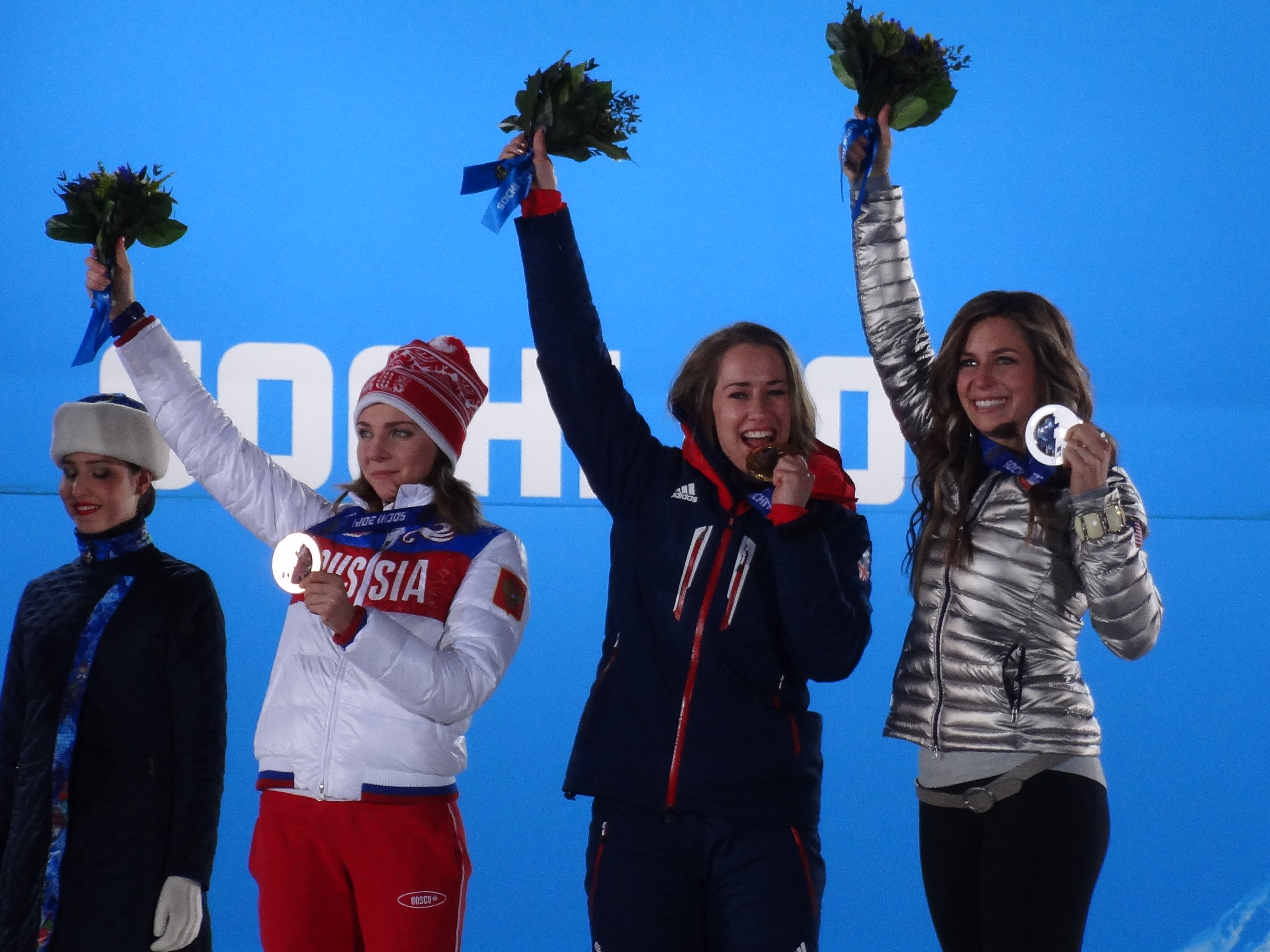 Соревнования по скелетону на зимних Олимпийских играх 2014 в Сочи прошли с 13 по 15 февраля в Центре санного спорта «Санки», расположенном возле Красной Поляны. Было разыграно 2 комплекта наград. На фото: Елена Никитина, Элизабет Ярнольд, Ноэль Пайкус-Пейс.